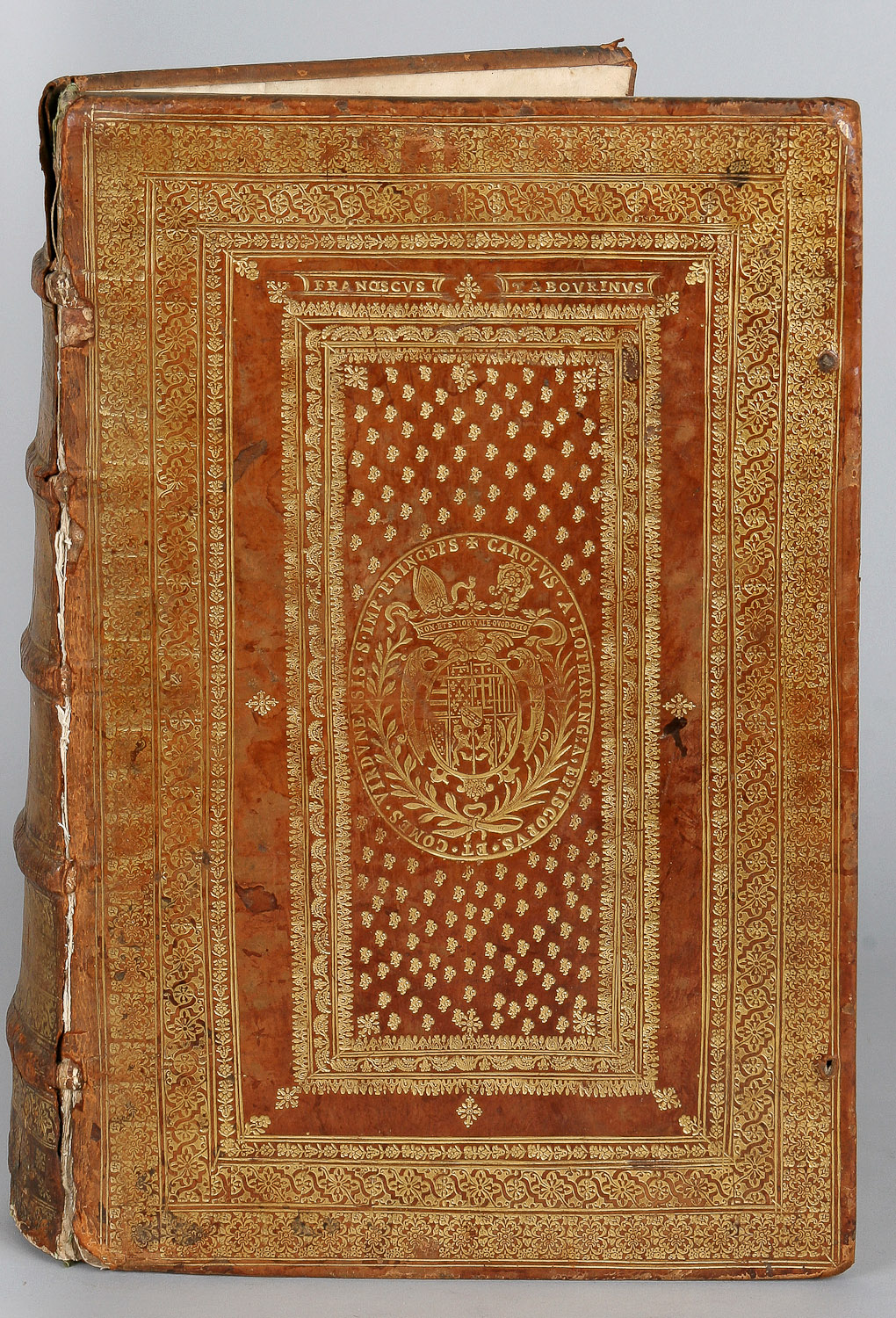 Reliure en veau blond au très riche décor à chaud aux armes de Charles de Lorraine, évêque et comte de Verdun. Date : 1612. Notes : Dans l'espace resté vierge, on trouve le nom du récipiendaire, Franciscus Tabourinus. Le volume n'a pu être donné avant le 30 mars 1611, date à laquelle Charles de Lorraine prend possession de l'évêché de Verdun. Accoler ses armes au titre d'évêque et au comte de Verdun n'est pas anodin et les faire frapper sur un support, quel qu’il soit est une marque d'affirmation. Bibliothèque-médiathèque de Nancy, Rés. 546. Plus de détails sur